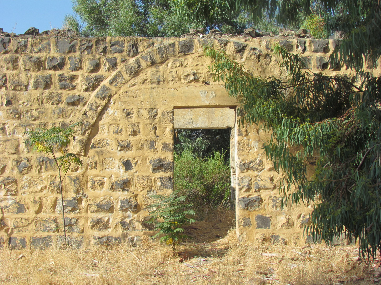 קבוצה של 16 משפחות איכרים יהודיים מחצי האי קרים שבאוקראינה התיישבה במקום כאריסיו של עבדול רחמן פאשה אל יוסוף, בעל אדמות בטיחה